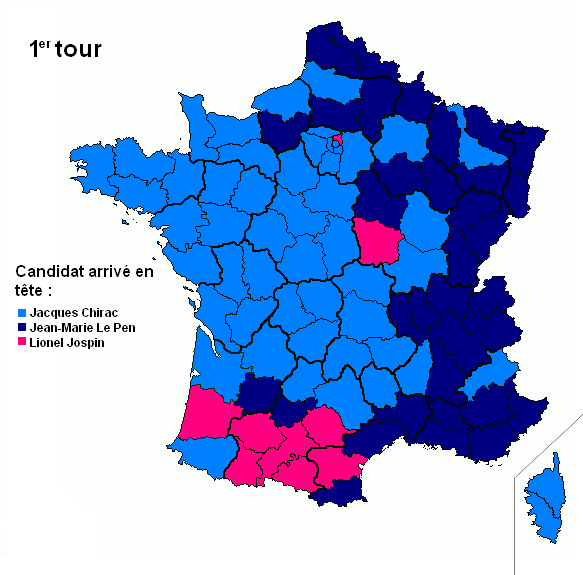 1er tour présidentielles 2002 France